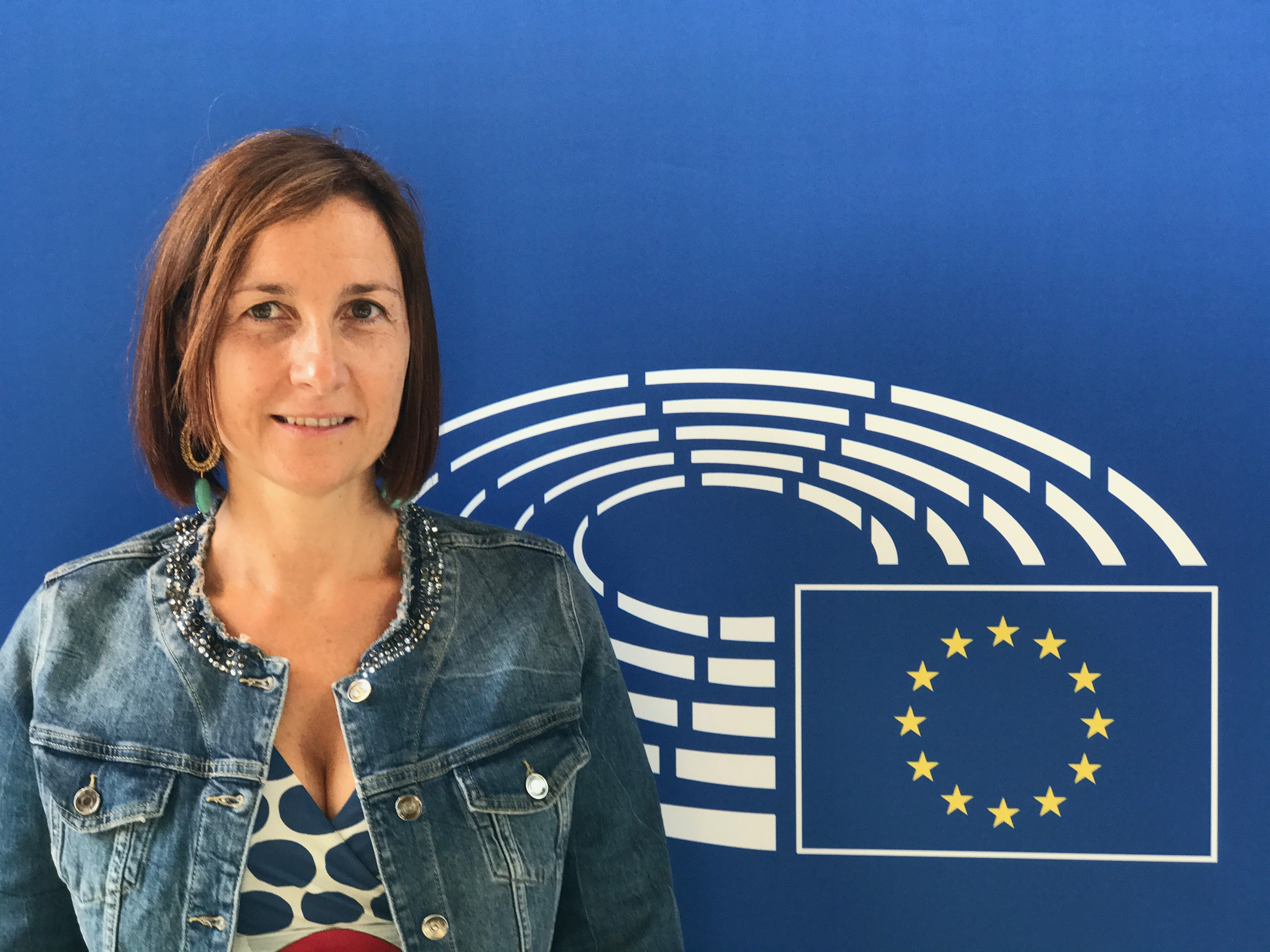 Renata Briano nel Parlamento europeo